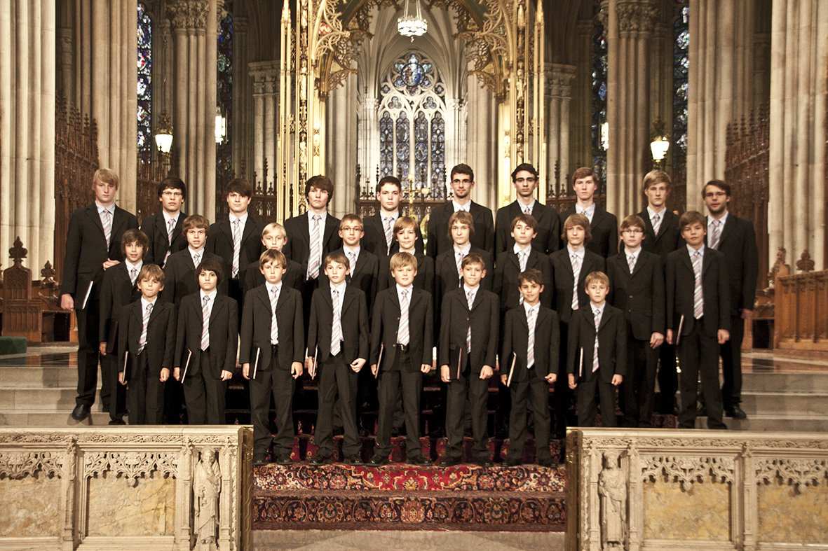 Der Knabenchor Hösel nach seinem Auftritt am 24. Juli 2011 in der St. Patrick's Cathedral von New York.